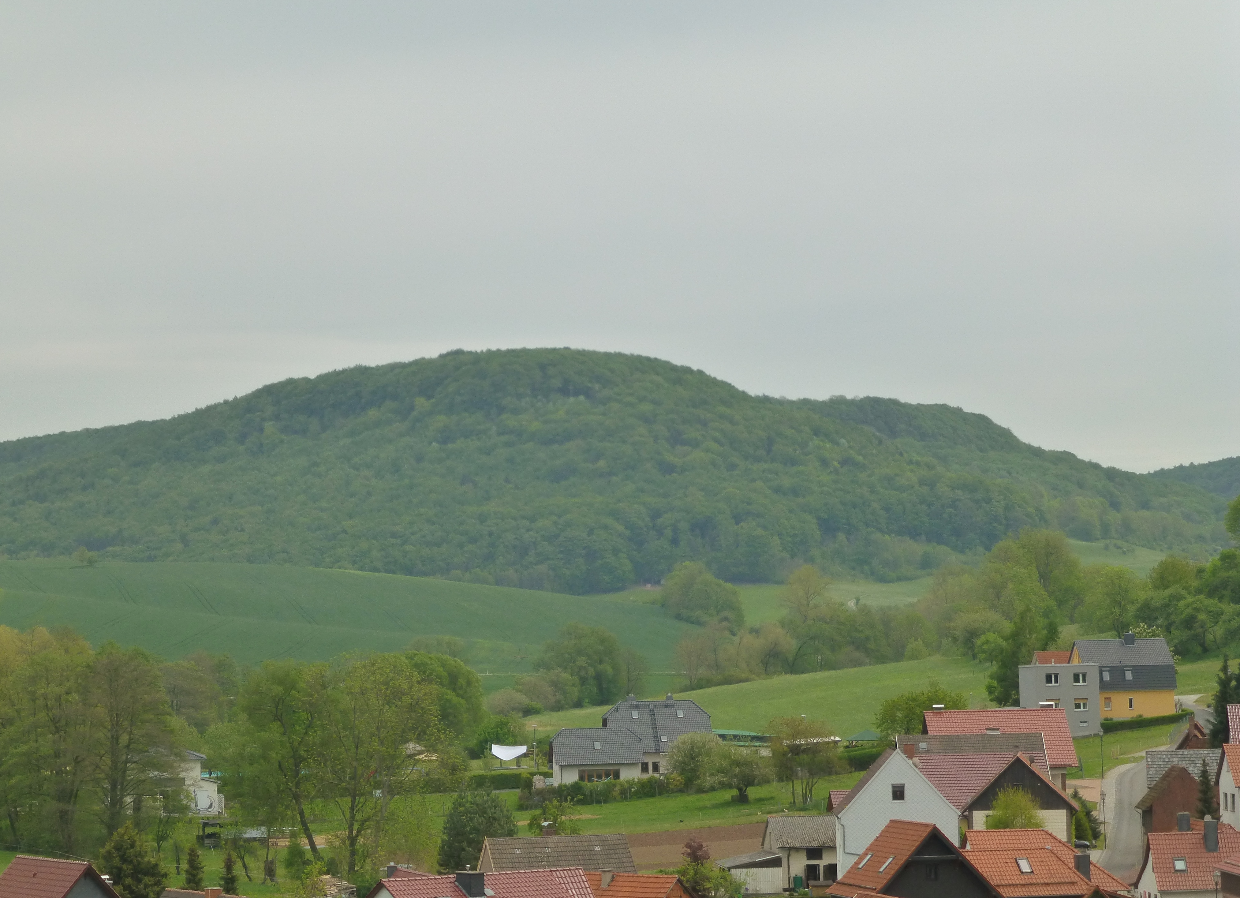 Blick von Lengenfeld zum Schlegelsberg